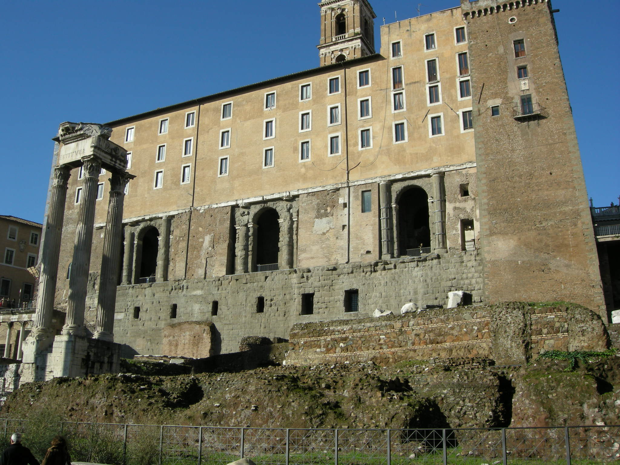 Tabularium